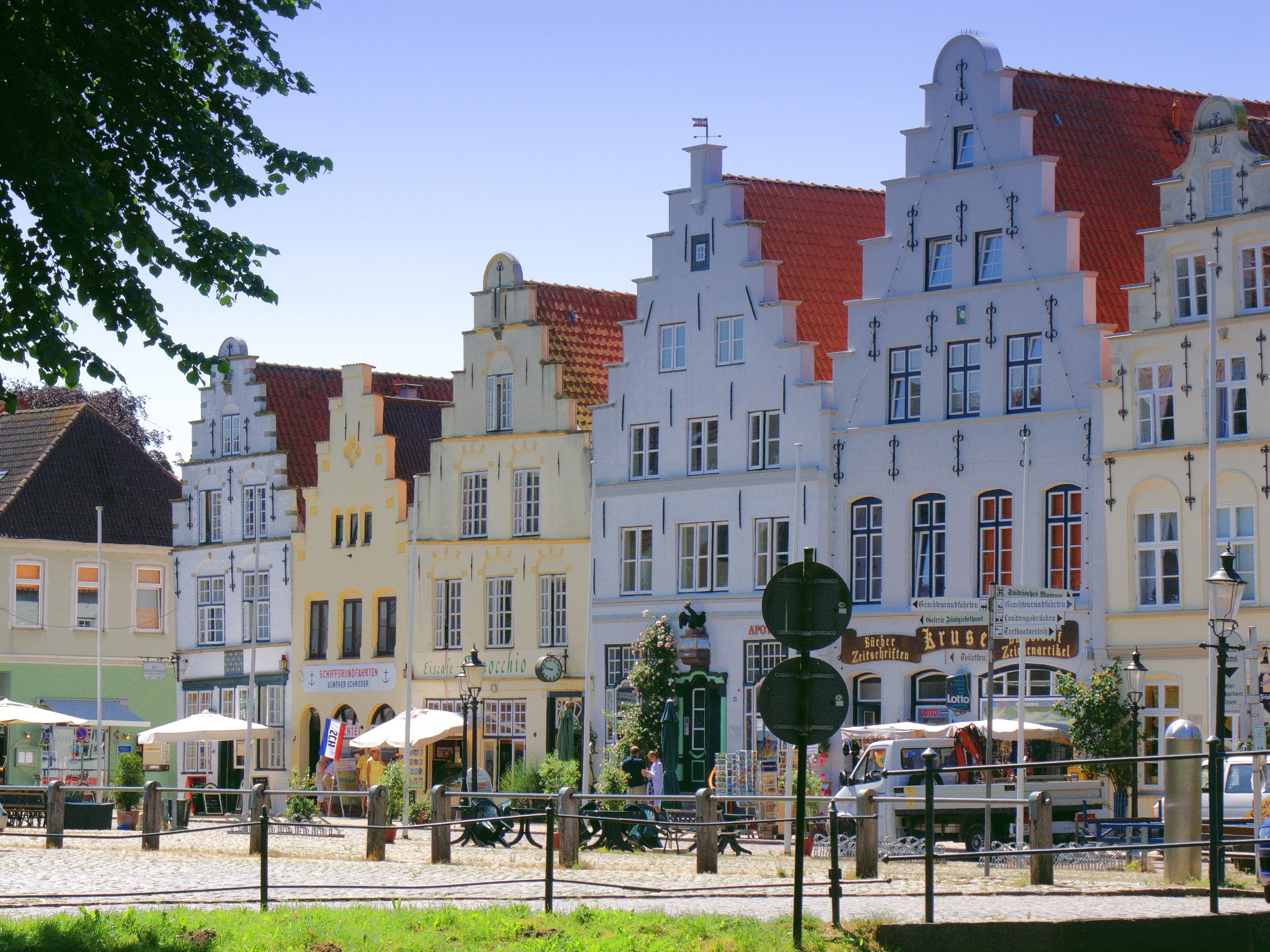 Alter Markt